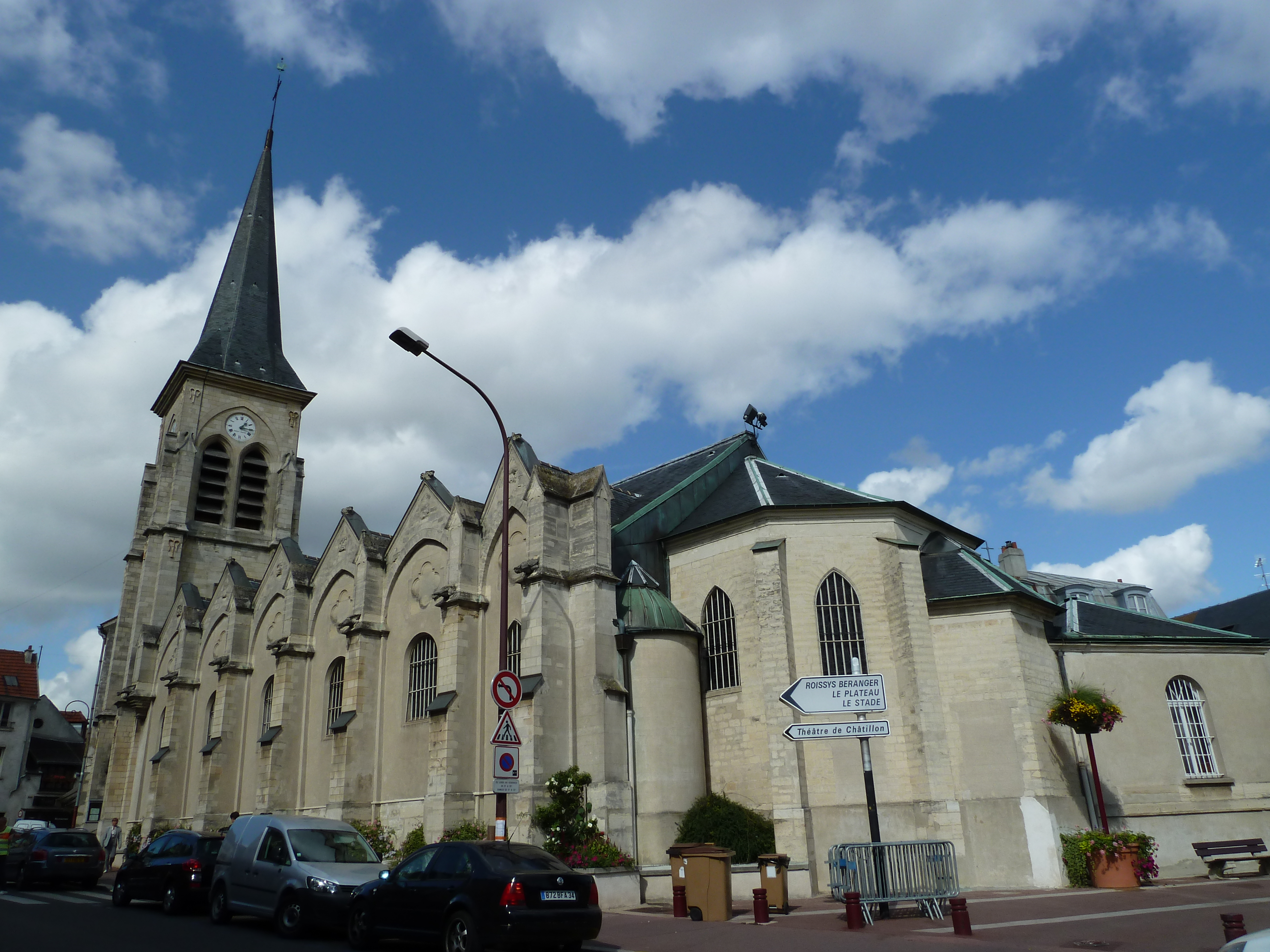 Église Saint-Philippe-et-Saint-Jacques - Châtillon - Haut-de-Seine – France – Mérimée PA00088090 .